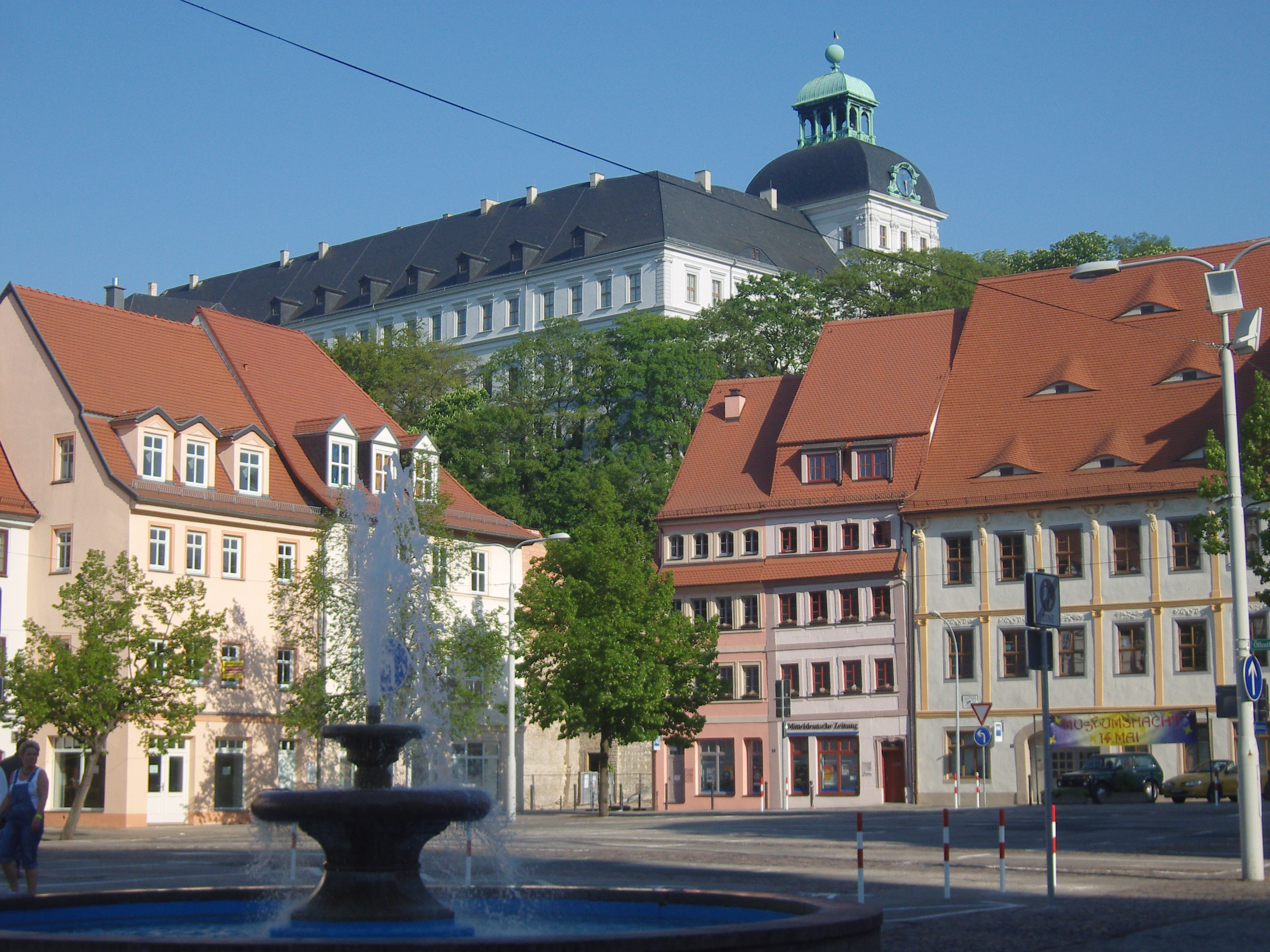 Weißenfels Blick zum Schloss